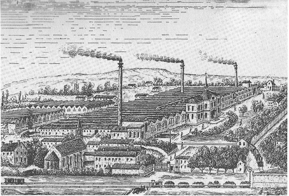 Le Val des Bois, béguinage industriel du à la famille Harmel.